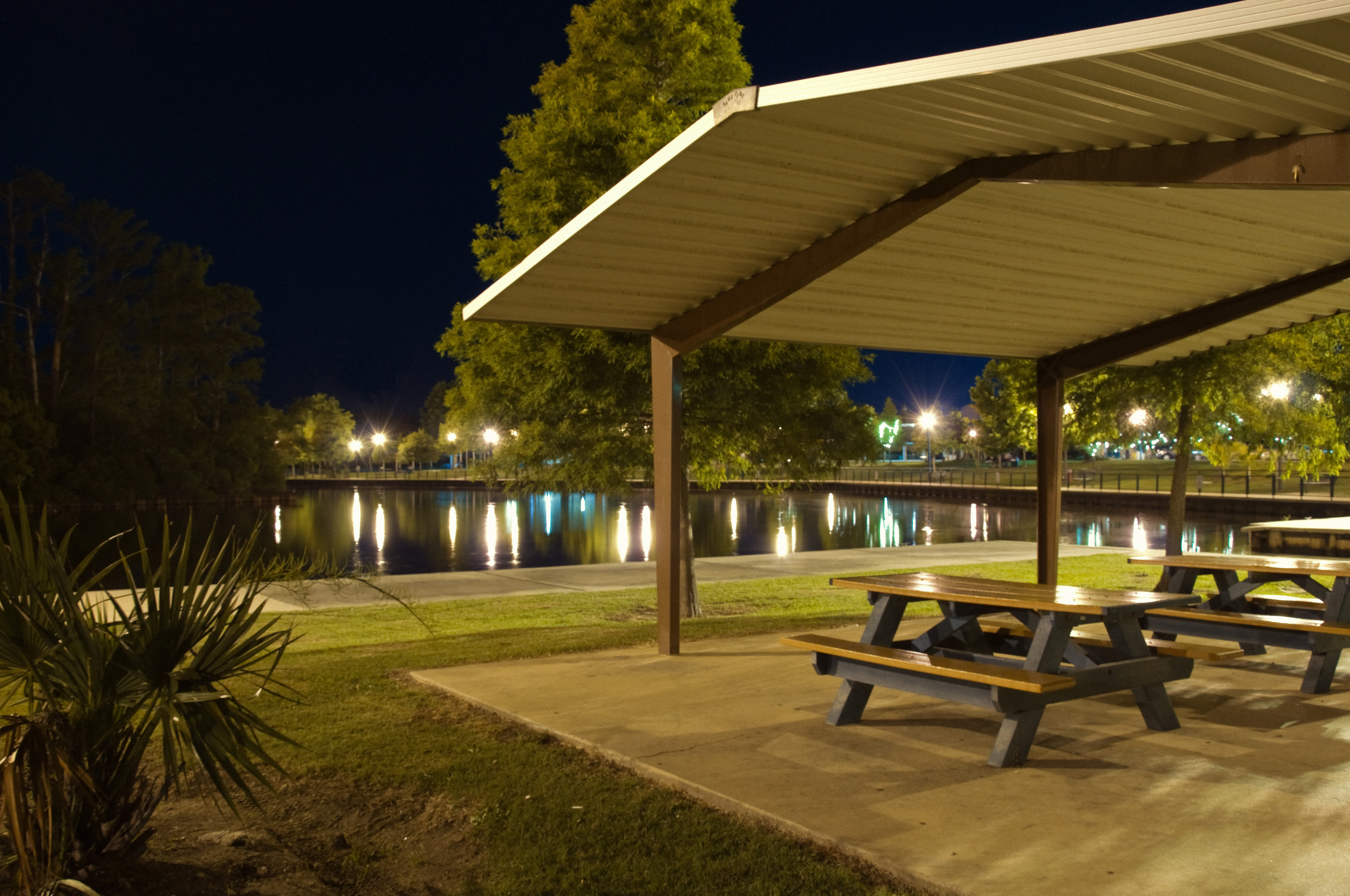 Heritage Park Slidell, Louisiana